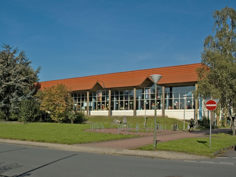 Germany Bergkamen Hallenbad